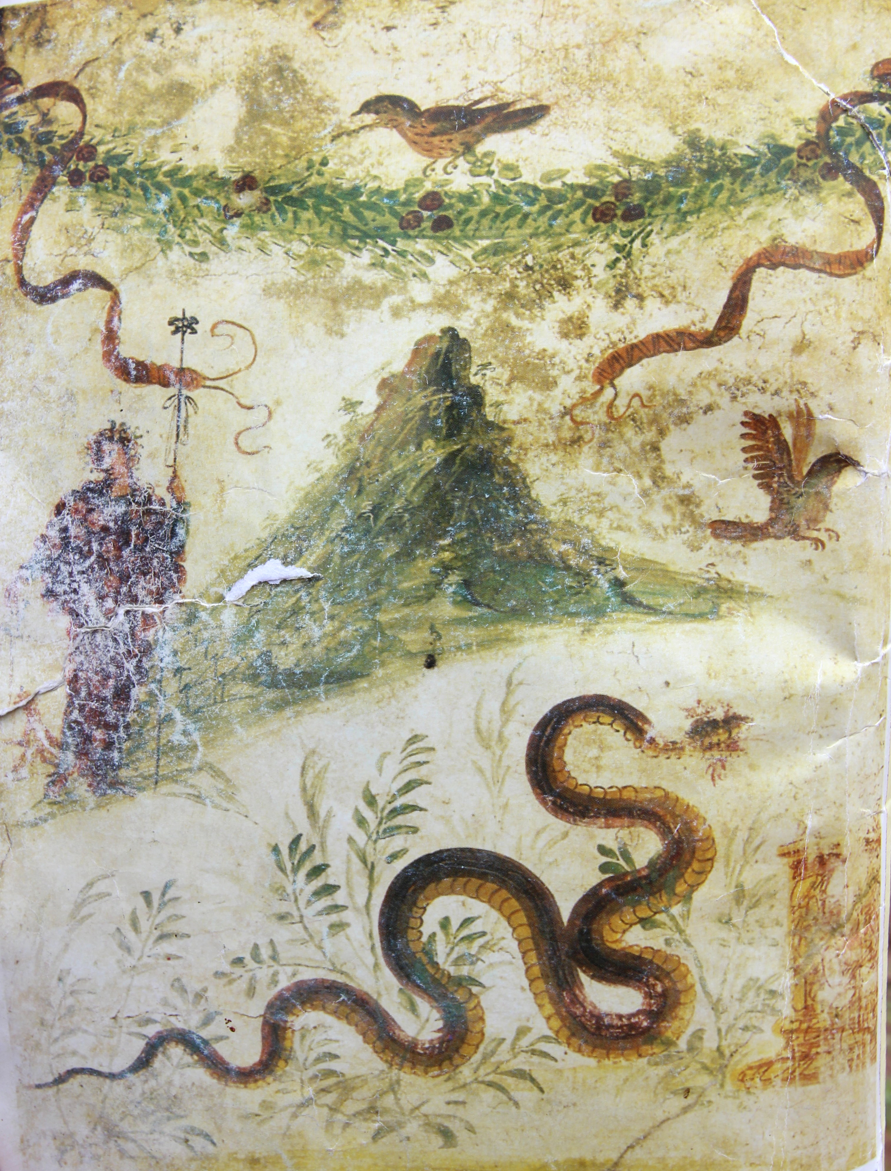 Fresko, das in Pompeji in der Casa del Centenario gefunden wurde. Es wird Bacchus mit dem Hintergrund des Vesuvs von Westen her gesehen dargestellt. So muss der Vesuv vor dem Ausbruch im Jahre 79 n. Chr. ausgesehen haben. Seine Hänge waren mit Weinreben bedeckt. Das Fresko befindet sich im Archäologischen Museum in Neapel.